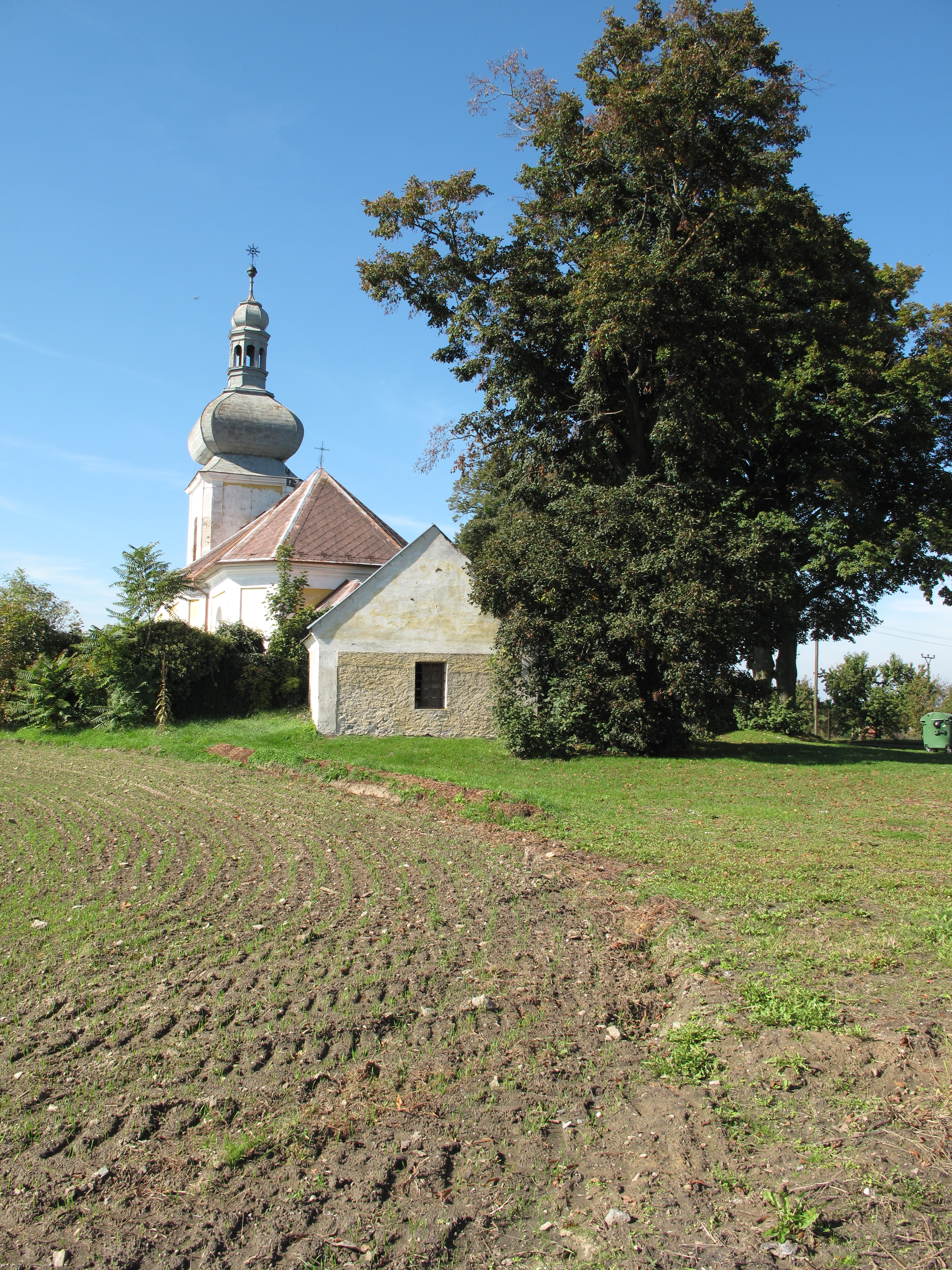 Kostel v Podvekách. Okres Benešov, Česká republika.